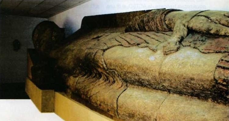 Buddha di Dushanbe